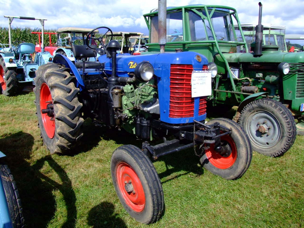 Zetor 25 mit 25 PS, Baujahr 1954